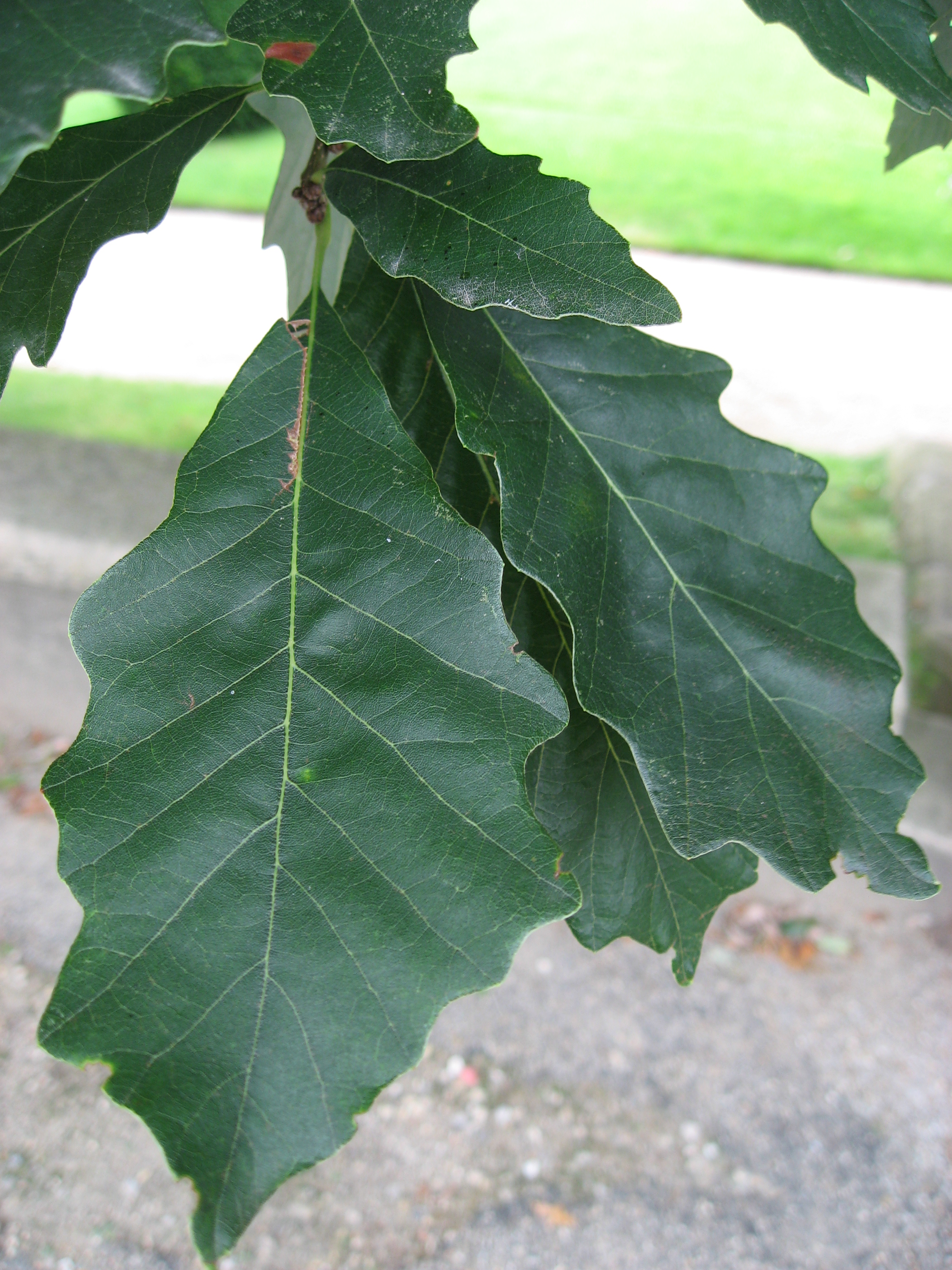 Quercus bicolor in Serres d'Auteuil Map: 48° 50' 49" N 2° 15' 8" E